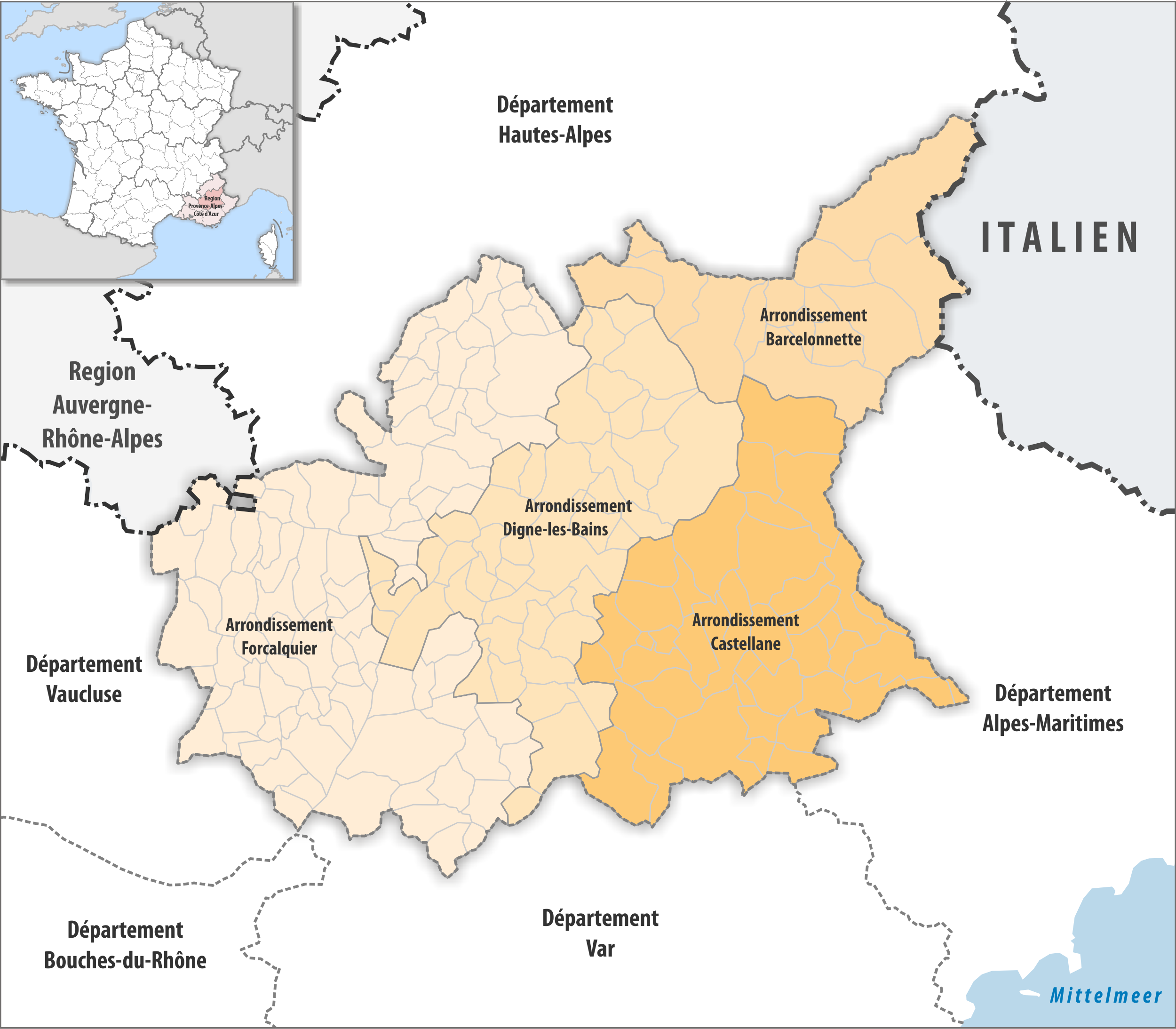 Gemeinden und Arrondissemente im Departement Alpes-de-Haute-Provence